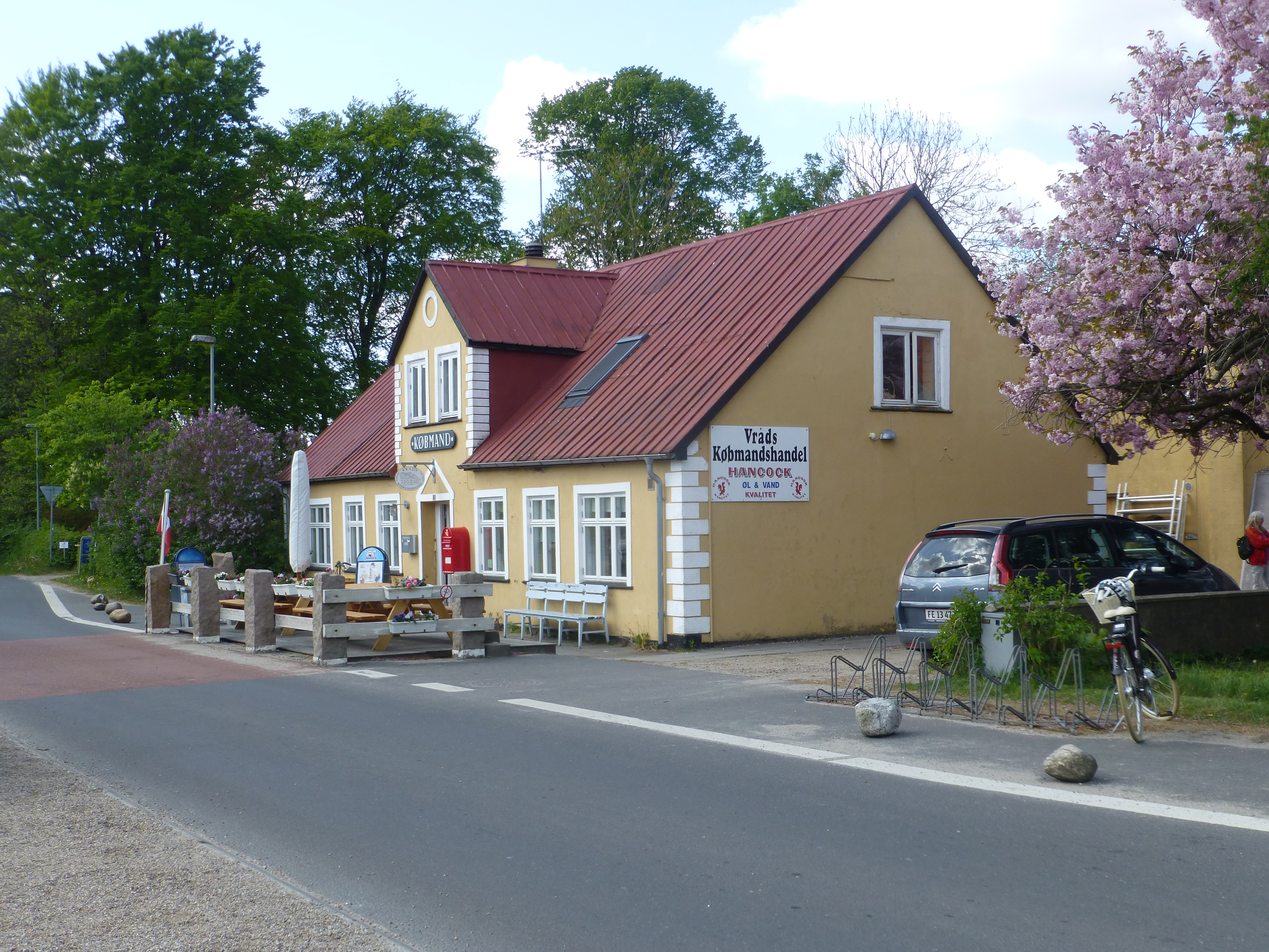 Vrads købmandsgård